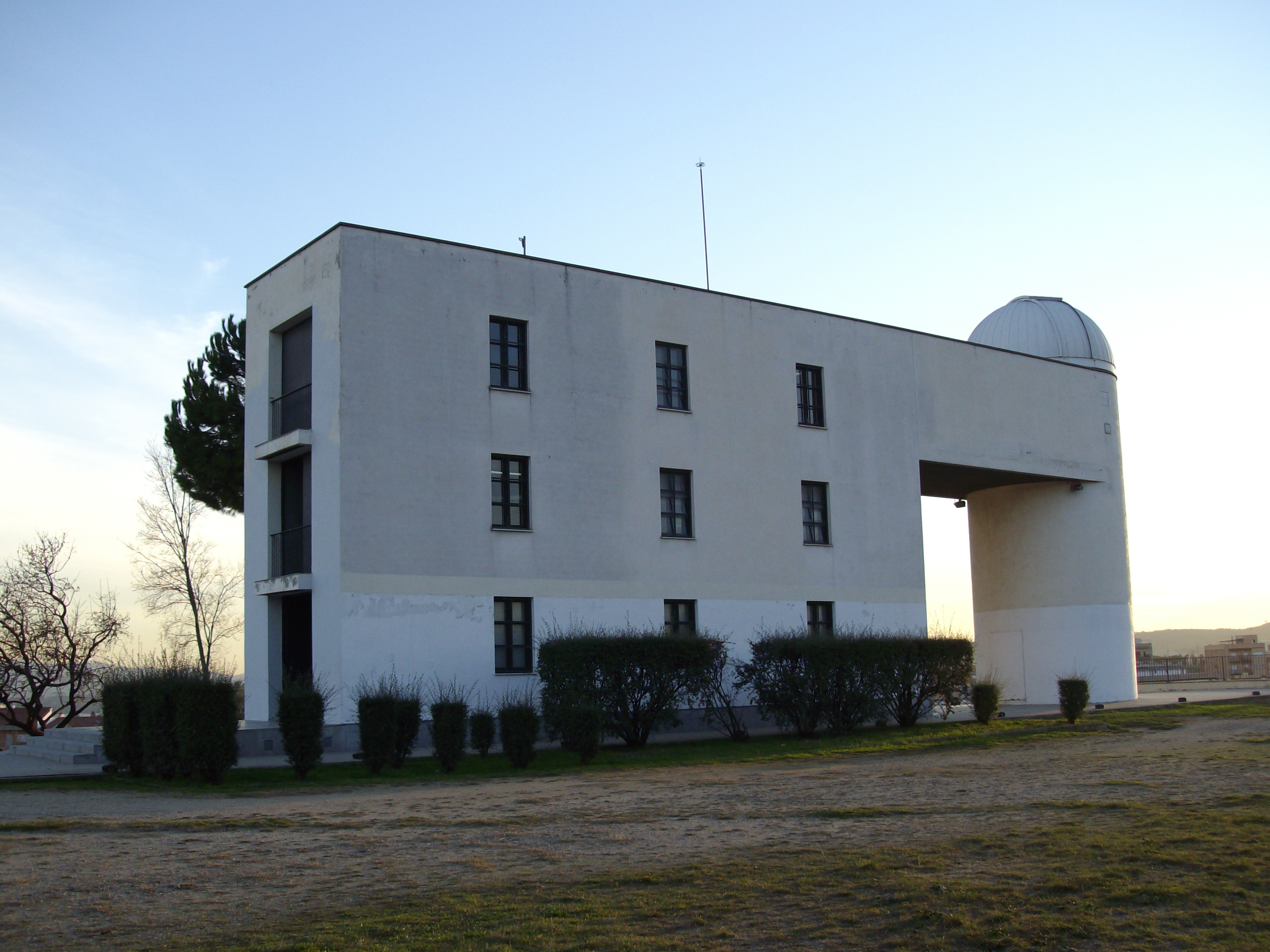 Observatorio de la Agrupación Astronómica de Sabadell.